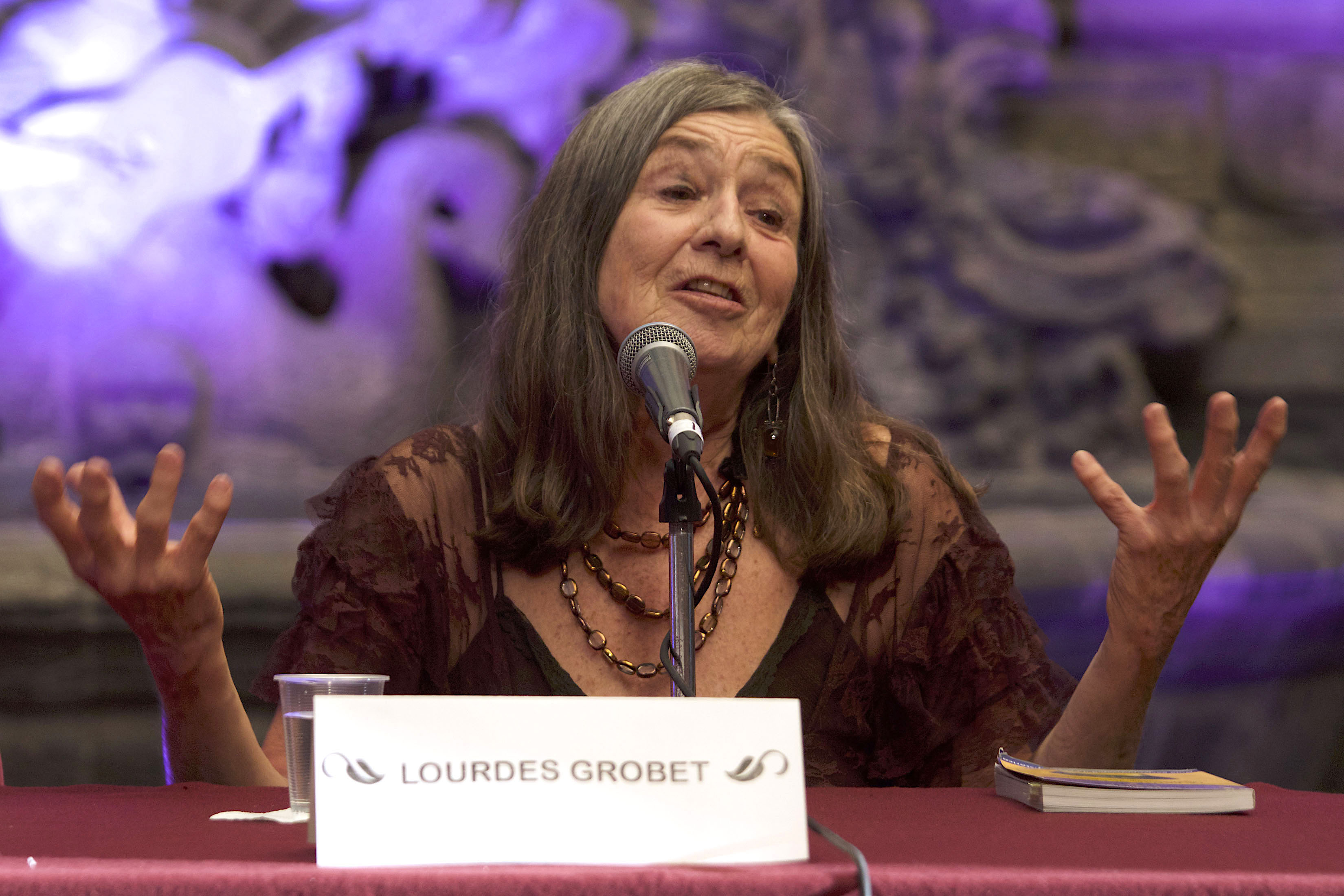 Jueves 31 de mayo de 2018. En el Museo de la Ciudad de México se presentó el libro La Panza al Centro. Guía gastronómica del Centro Histórico de la Ciudad de México, con comentarios de la fotógrafa Lourdes Grobet, del investigador y escritor Arturo Villegas y como moderador José María Espinasa, director del recinto. Fotografía: Milton Martínez / Secretaría de Cultura CDMX.